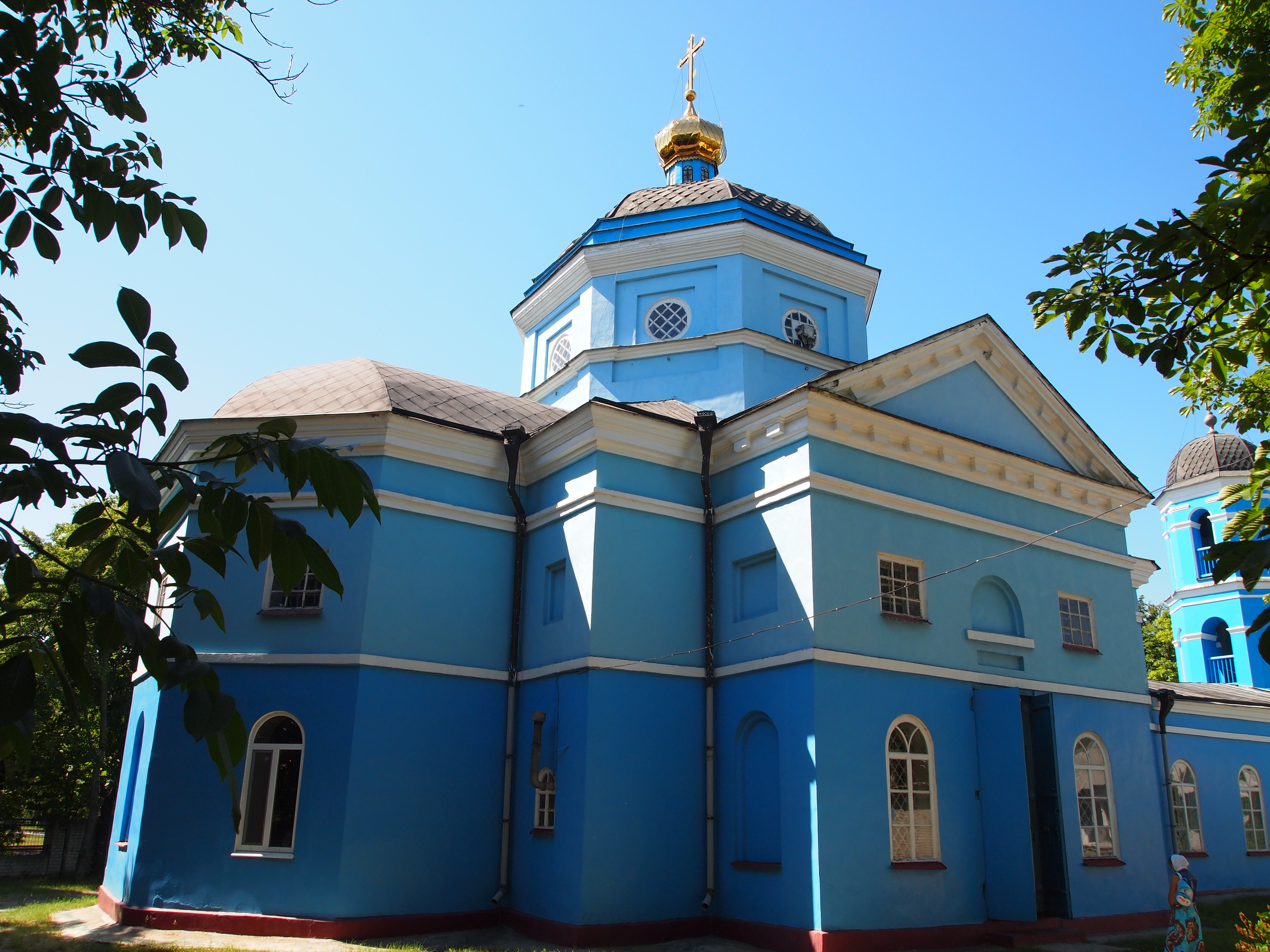 Михайлівська церква (діюча), Пересічне, площа Конєва, 1